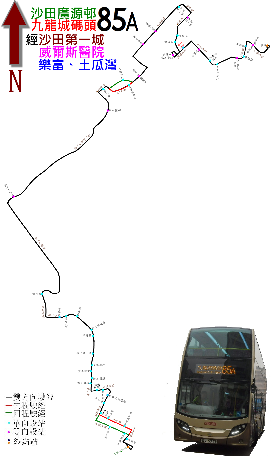 中文（香港）: 九巴85A線的走線圖